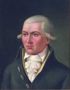 Hans Midelfart Eier: Eidsvoll 1814